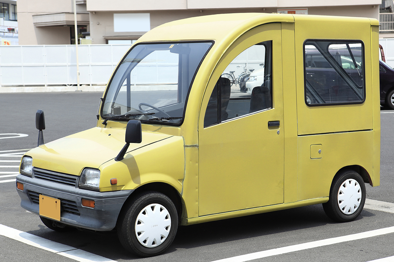 Daihatsu Mira Michito